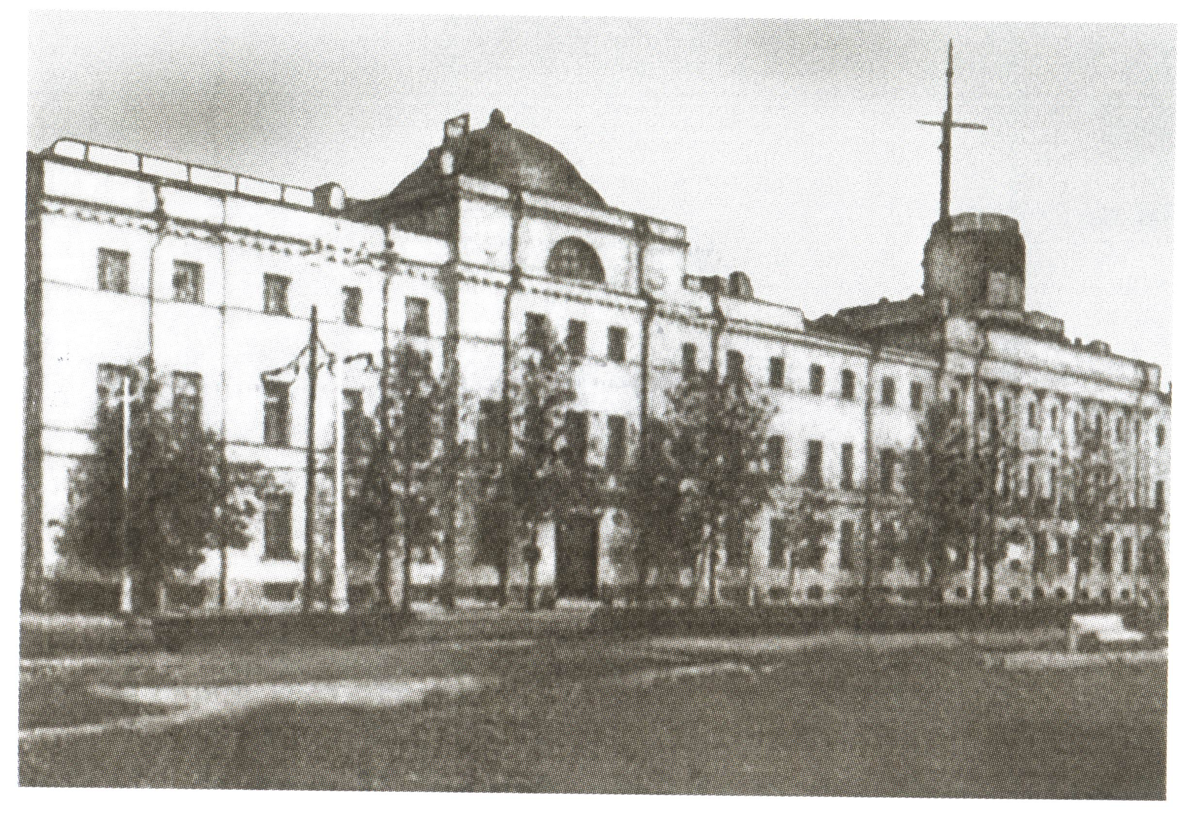 Здание Морского кадетского корпуса на Васильевском острове СПб., который А.В. Колчак окончил в 1894 г. Открытка начала XX века